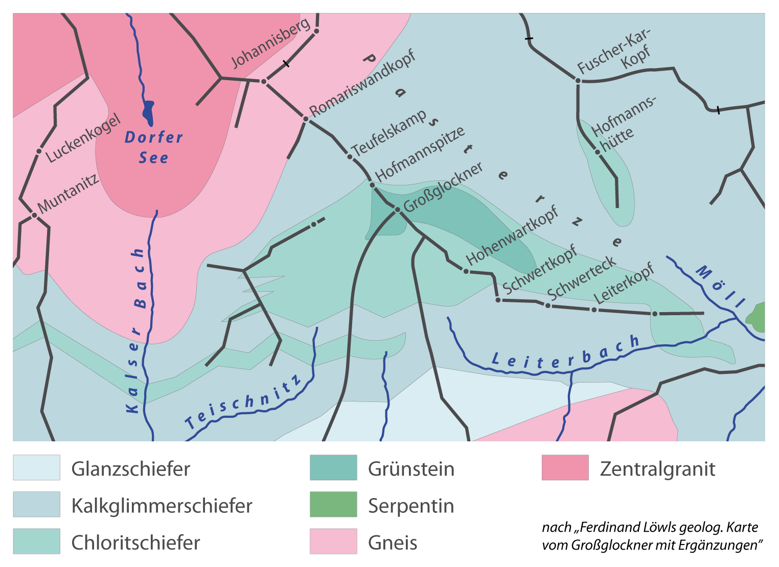 Ferdinand Löwls geolog. Karte vom Großglockner mit Ergänzungen (Bearbeitung)